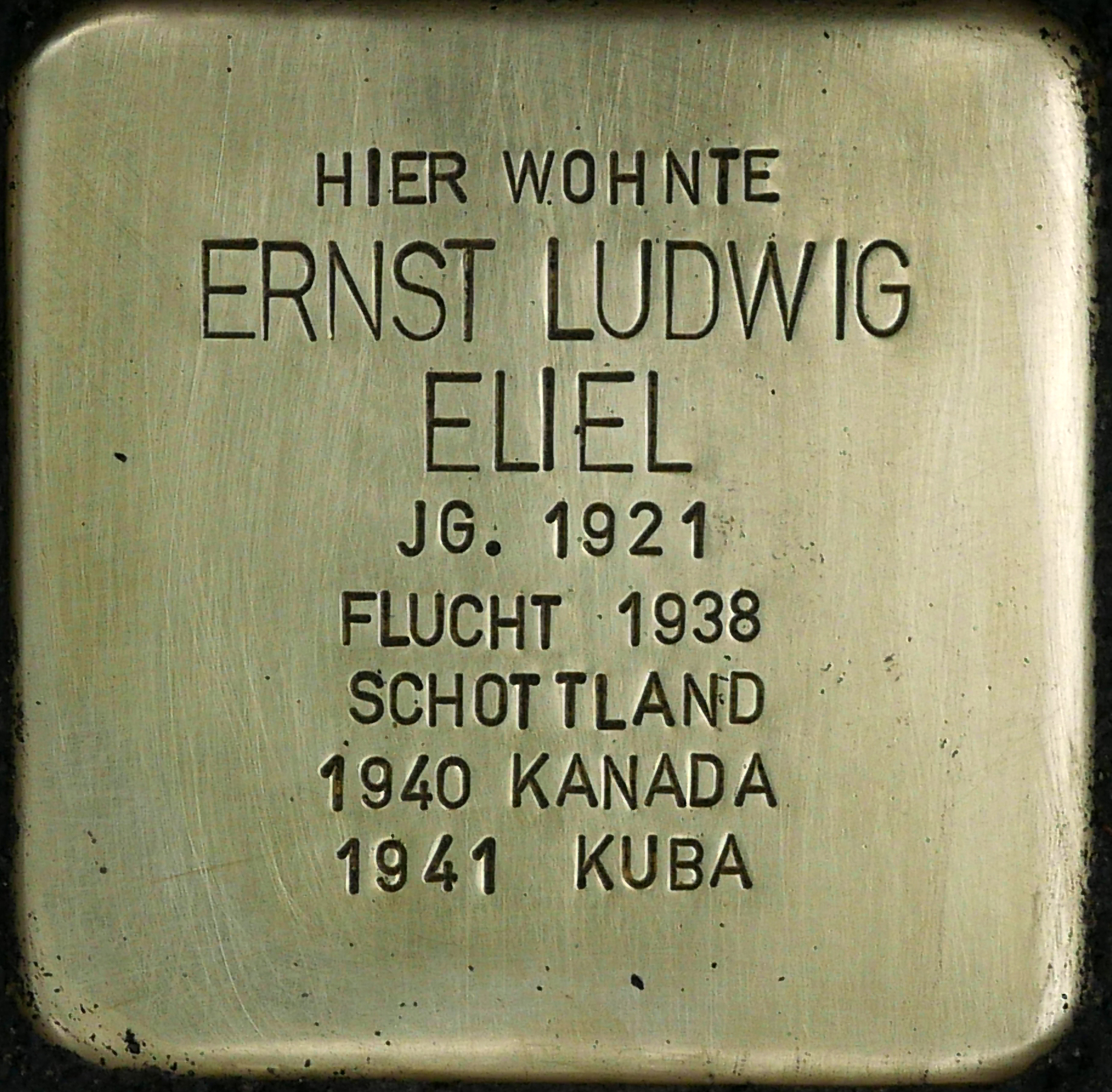 Stolpersteinverlegung für Ernst Ludwig Eliel in Köln-Braunsfeld, Voigtelstrasse 22 auf Initiative des Deutschen Alpenvereins,Sektion Köln